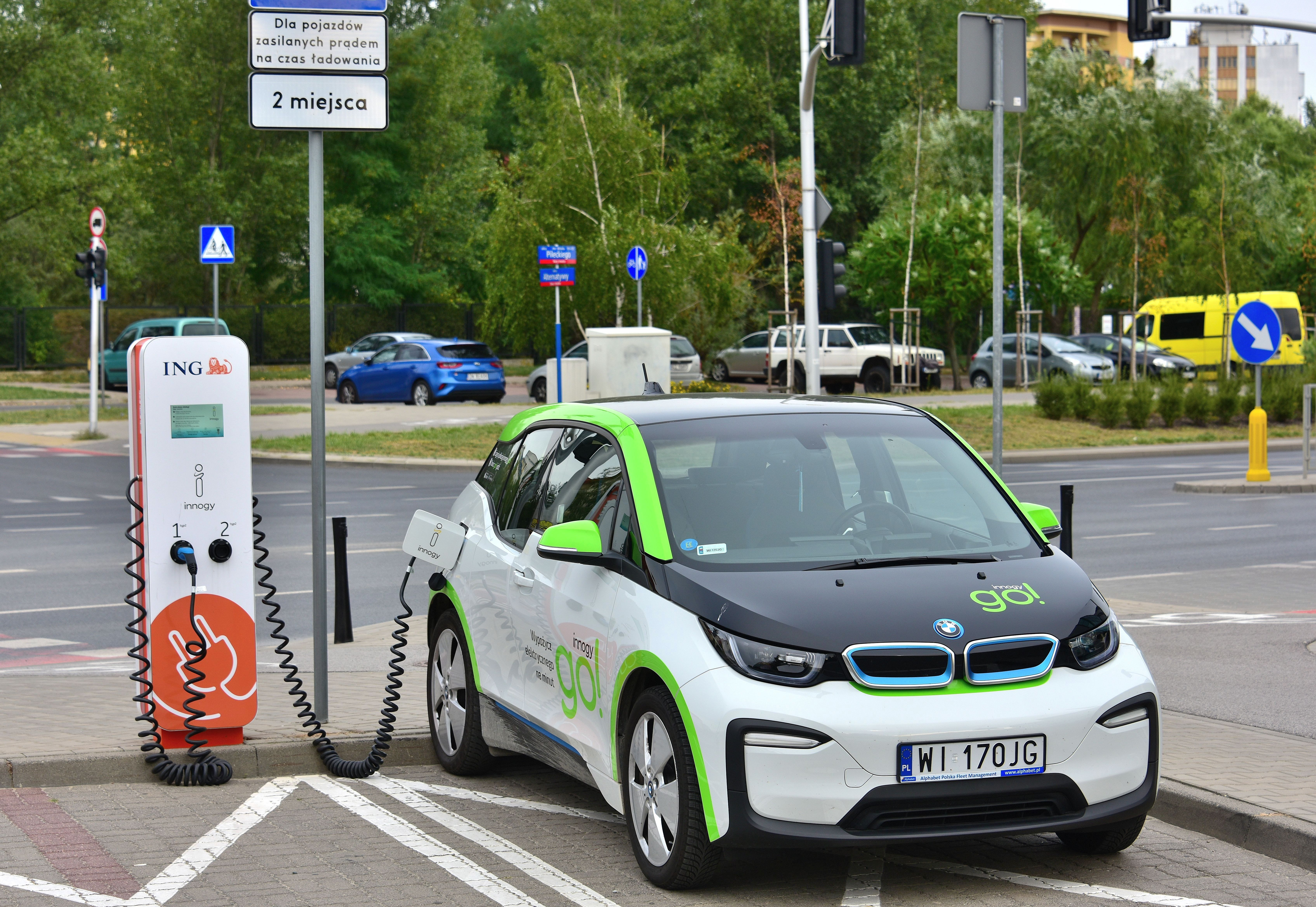 Punkt ładowania samochodów elektrycznych ul. rtm. Witolda Pileckiego w Warszawie